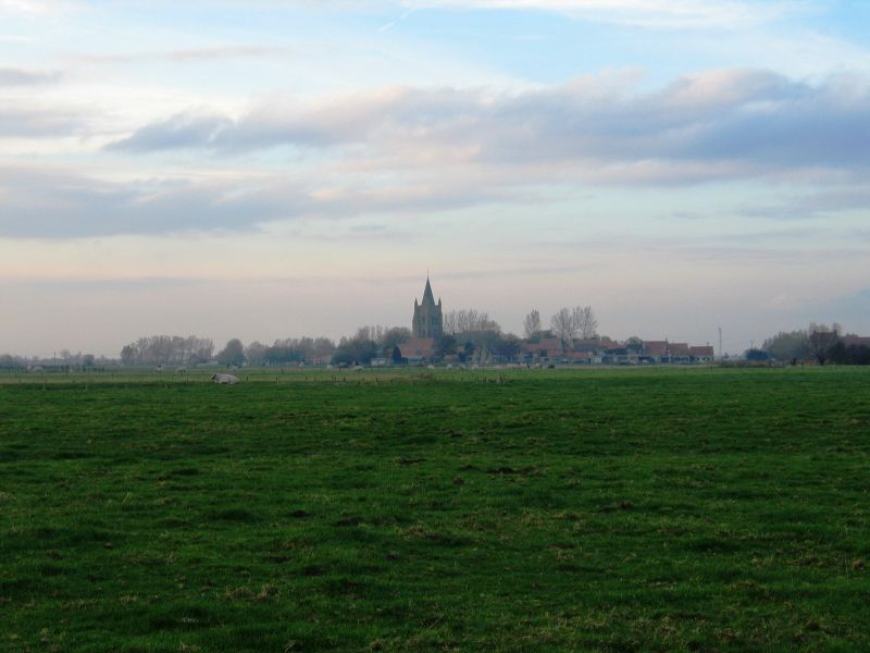 Lampernisse - eigen foto